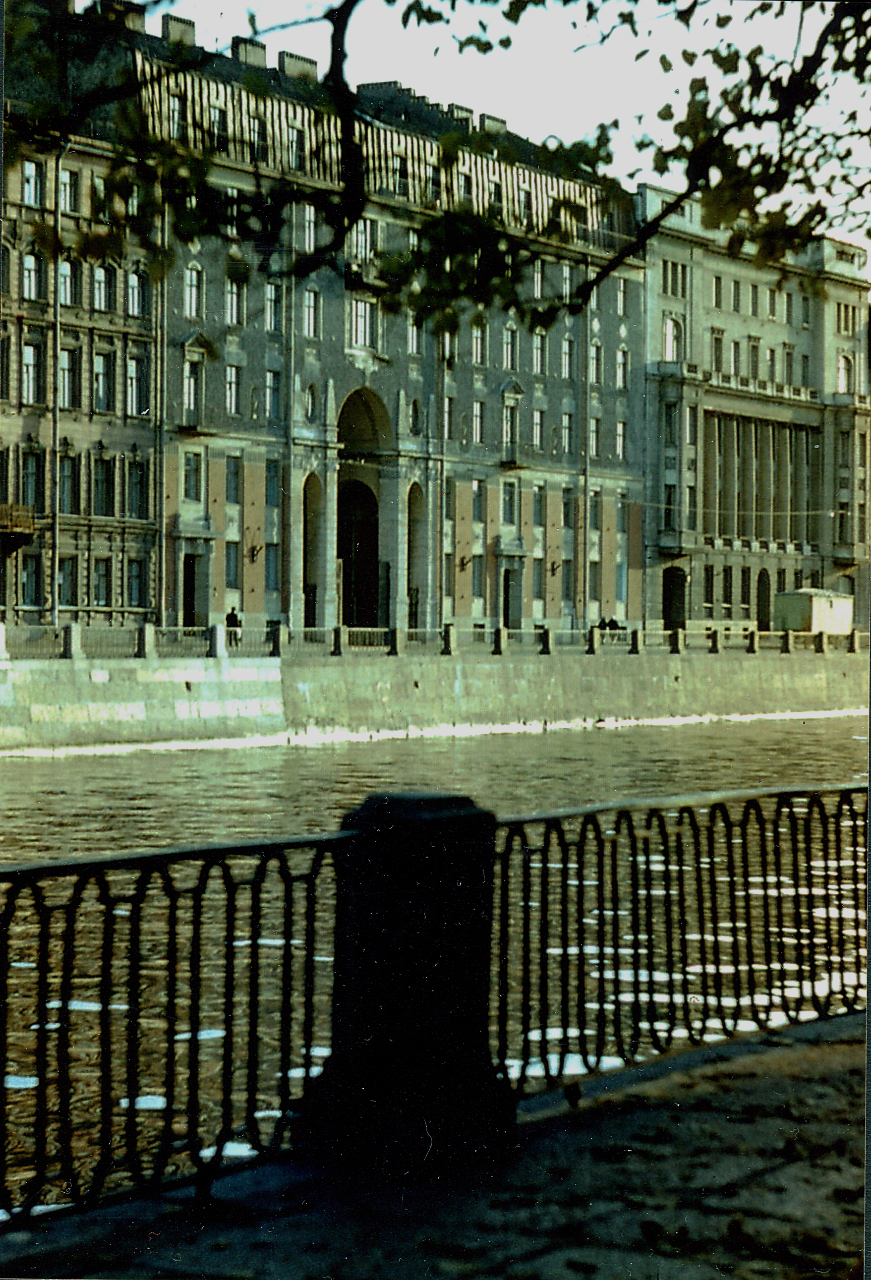 Лидваль.Фонтанка 24.Дом Толстого